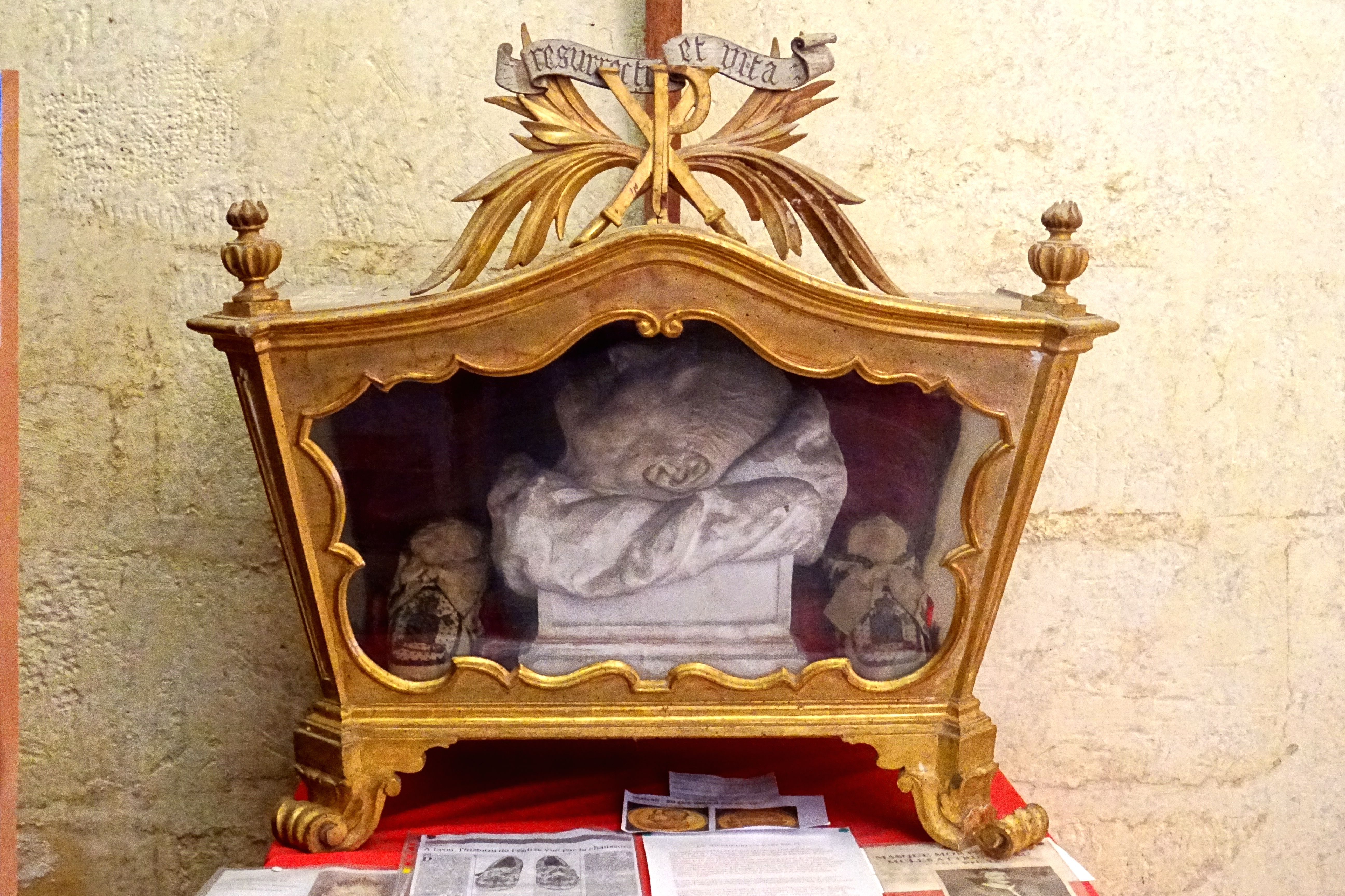 Châsse, mules et masque funéraire du pape Pie IX. La châsse, de style Louis XV, est en bois doré, et date du dernier quart du XIXe siècle.